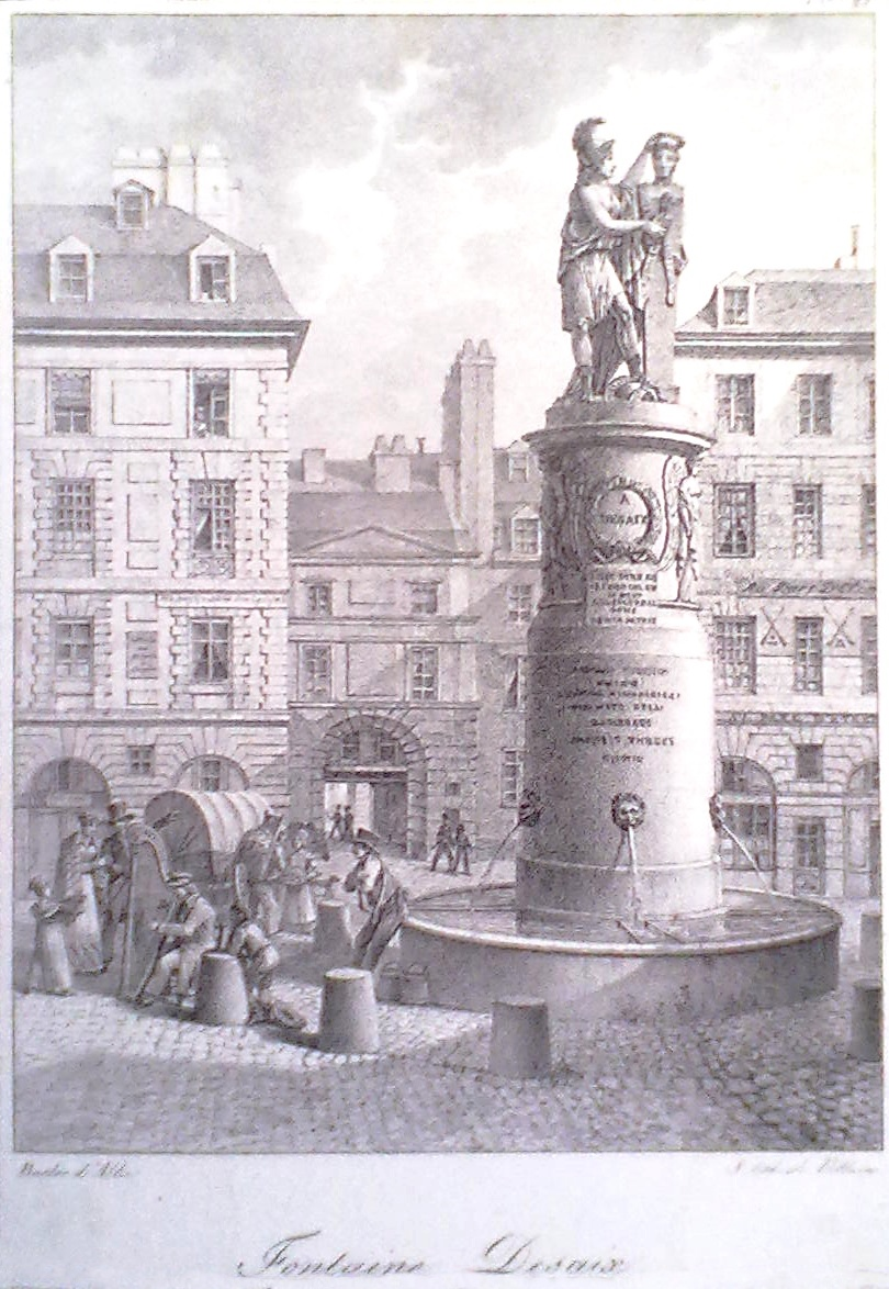 La fontaine Desaix (place Dauphine, 1er arrond. de Paris), au début du XIXe siècle. Lithographie de Louis Albert Guislain Bacler d'Albe (1761-1824).